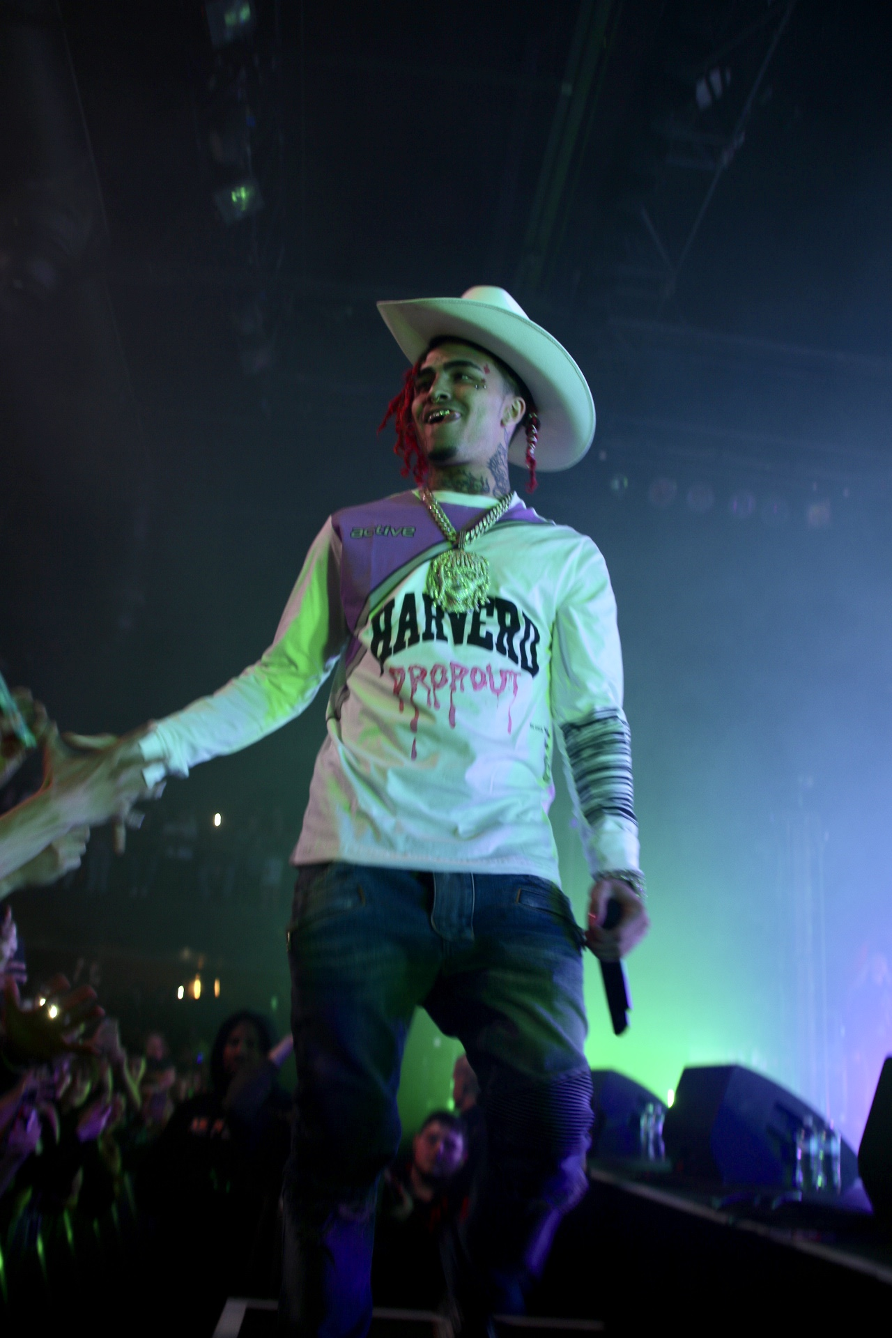 Lil Pump ::: Fillmore Auditorium ::: 05.01.19